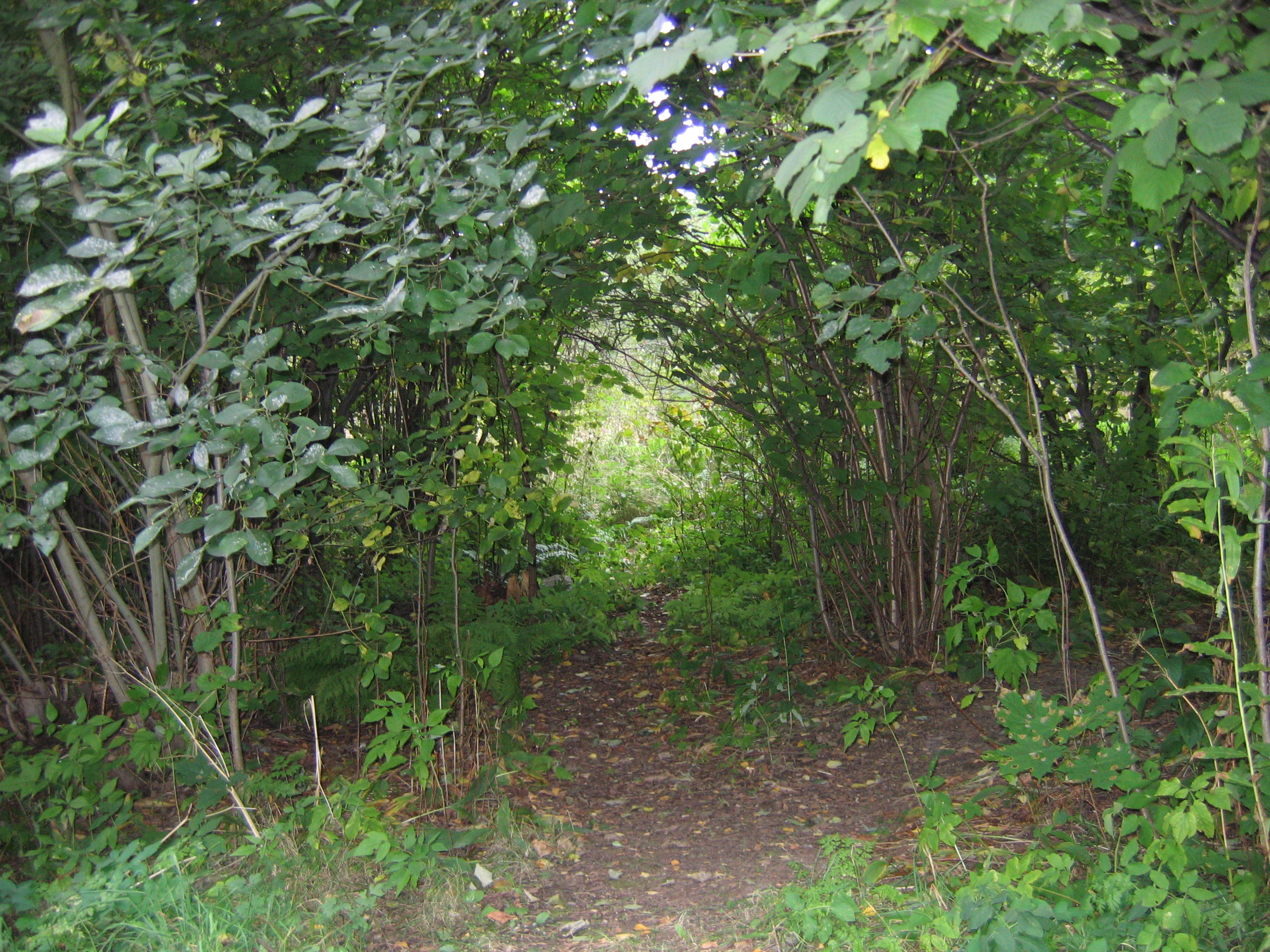 Leppisaaren puisto Tammisalossa.